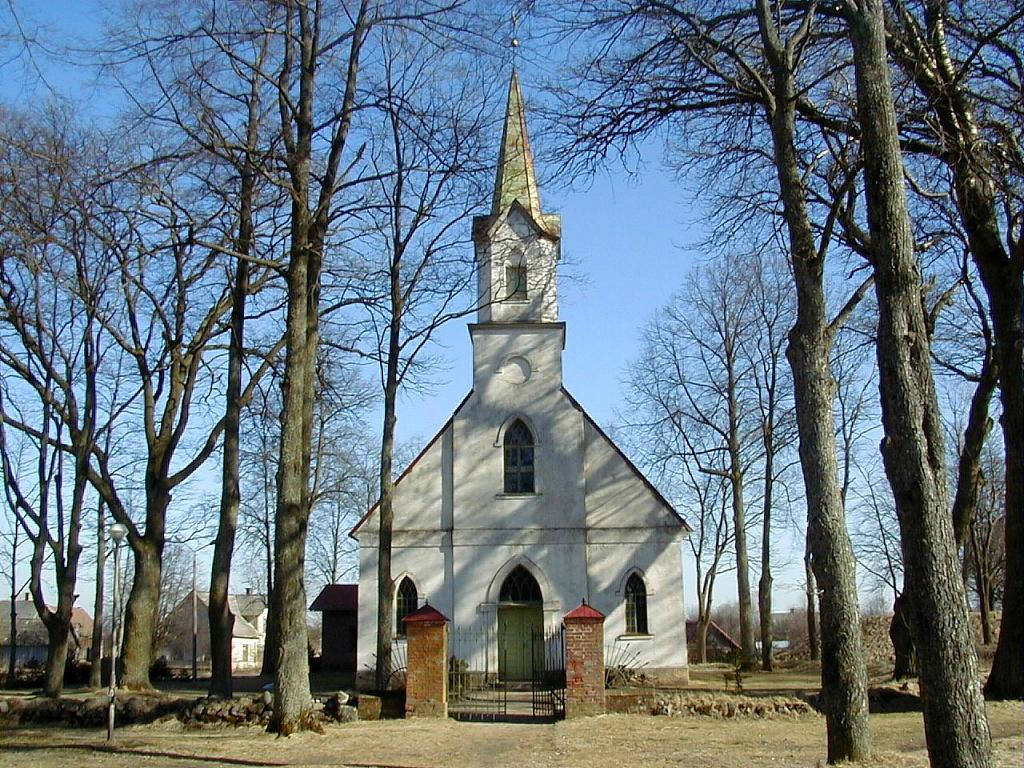 Salacgrīvas luterāņu baznīca 2002-03-16